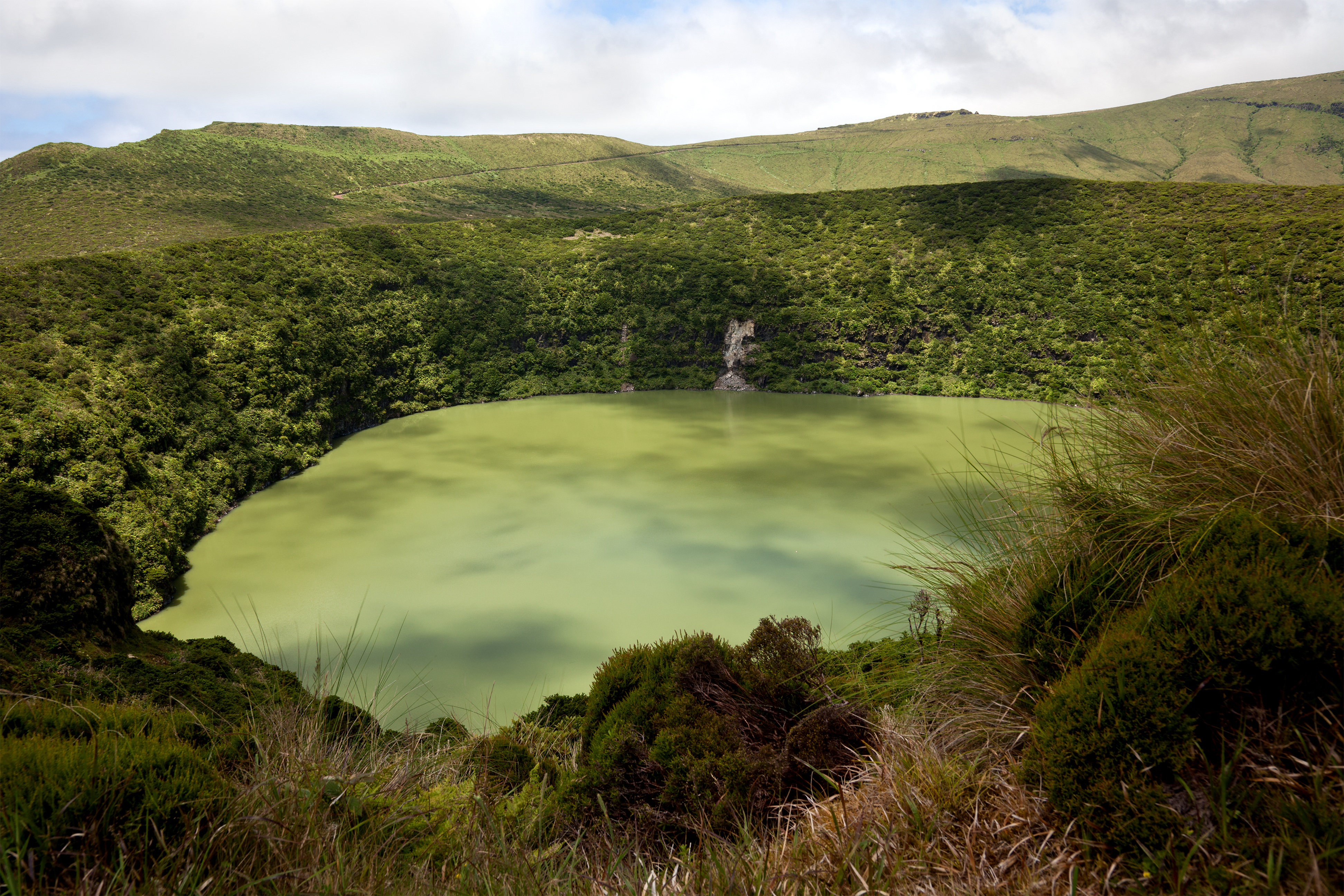 Lagoa Funda (Caldeira Funda, Lagoa Negra), Flores Island, Azores